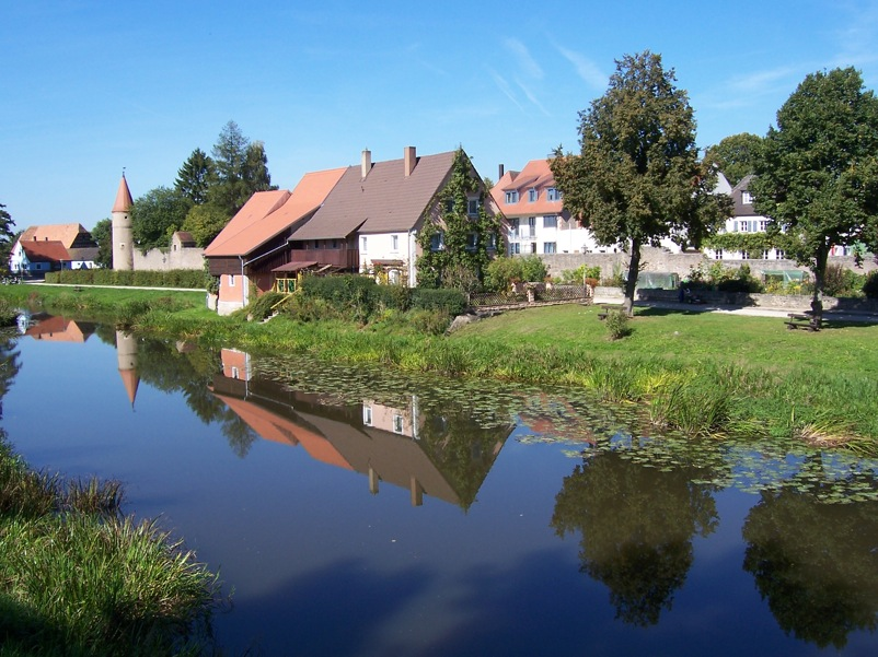 Altmühlpartie an der Stadtmauer in Ornbau